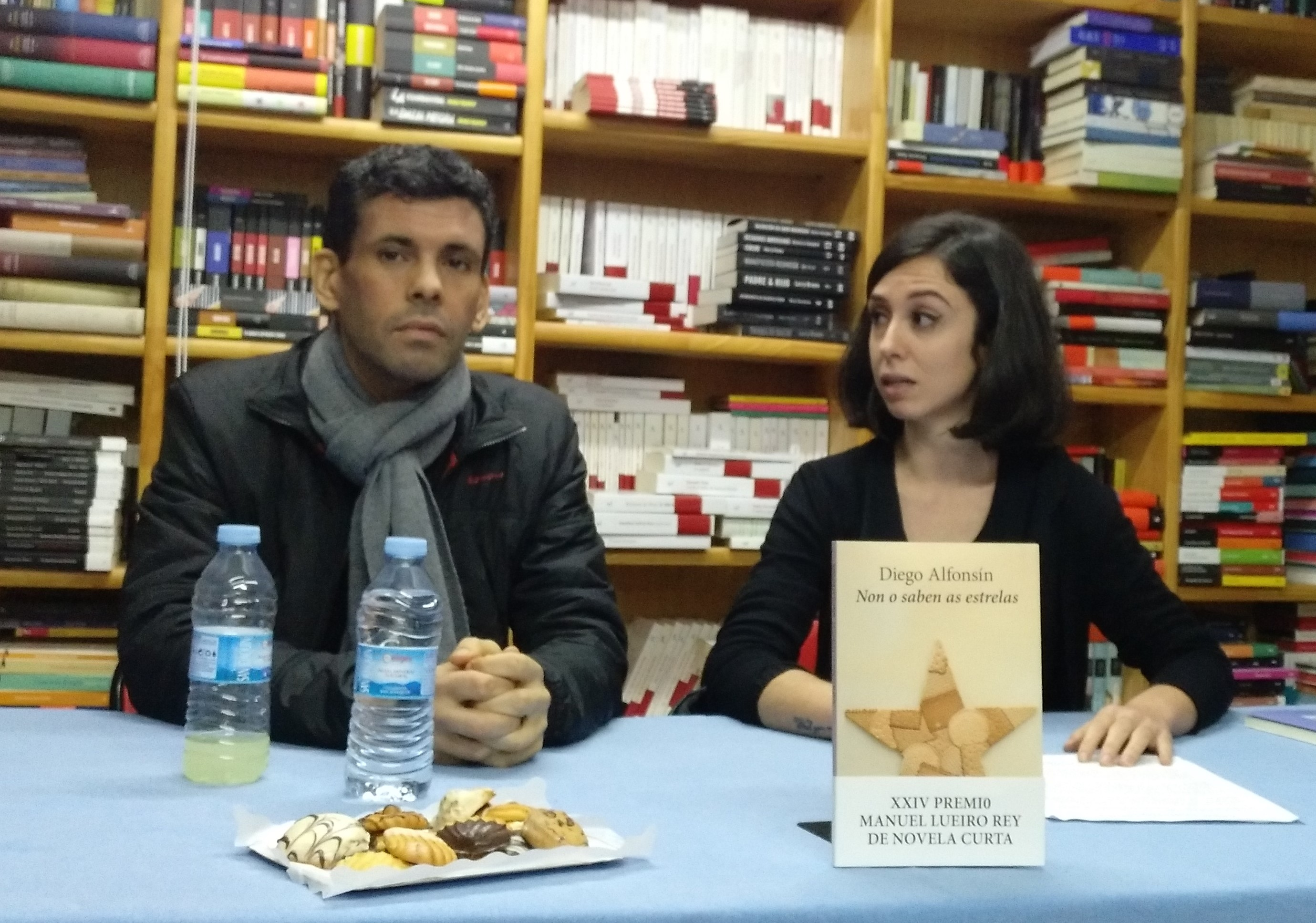 Presentación de "Non o saben as estrelas" de Diego Alfonsín na Libraría Paz de Pontevedra, con Tamara Andrés